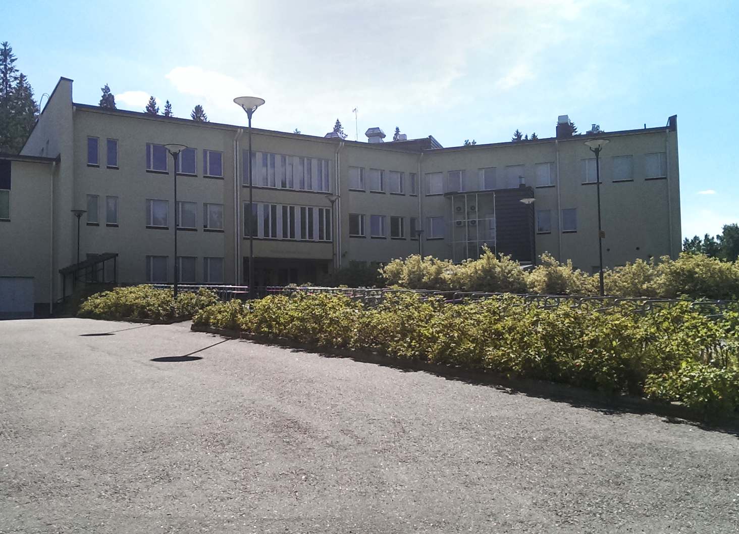 Hyvinkään Tapainlinnankoulu